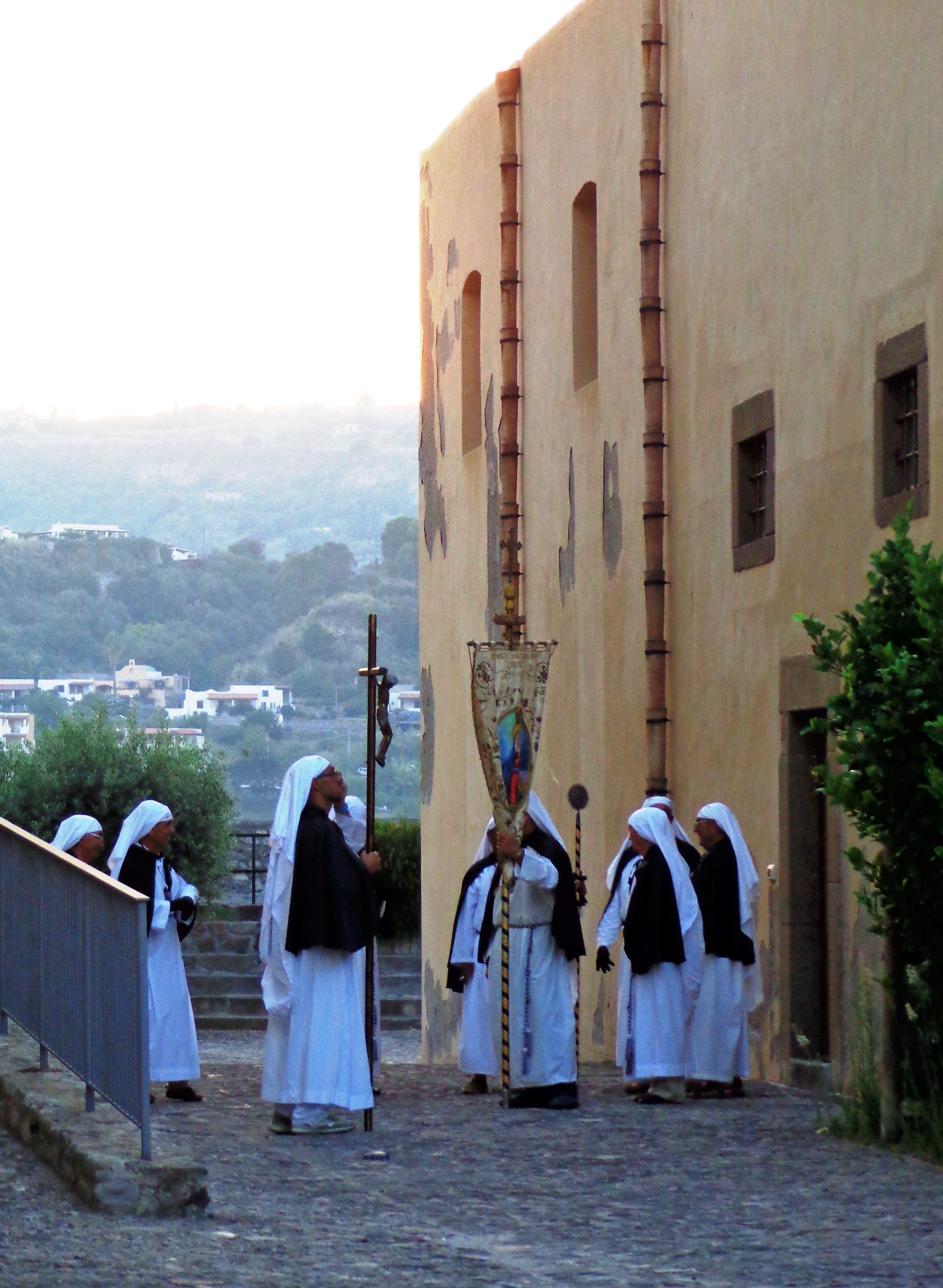 Babbaluci